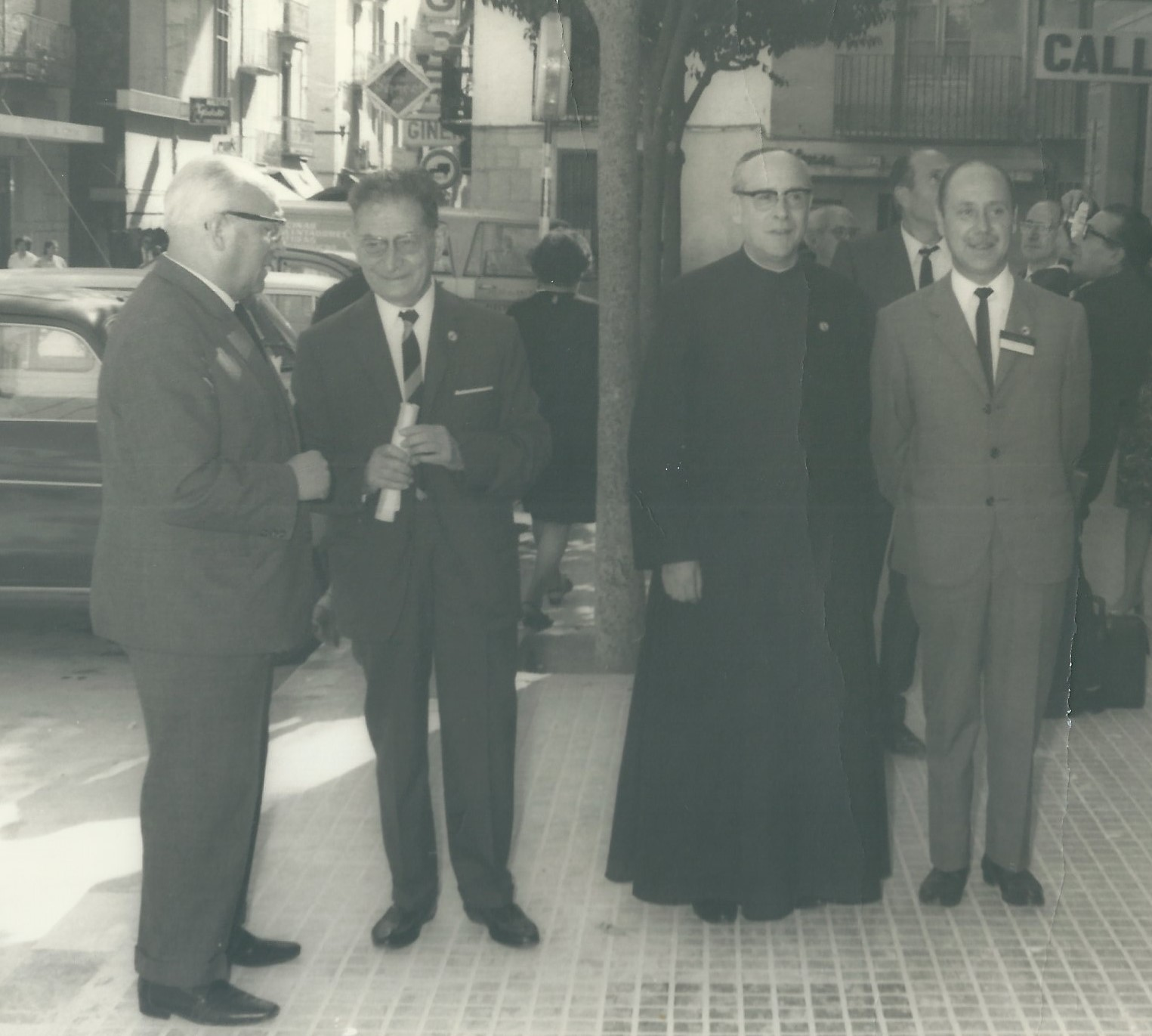 Emilio Beüt, Enrique Matalí y Santiago Bru i Vidal en una asamblea de cronistas en Vinaroz.